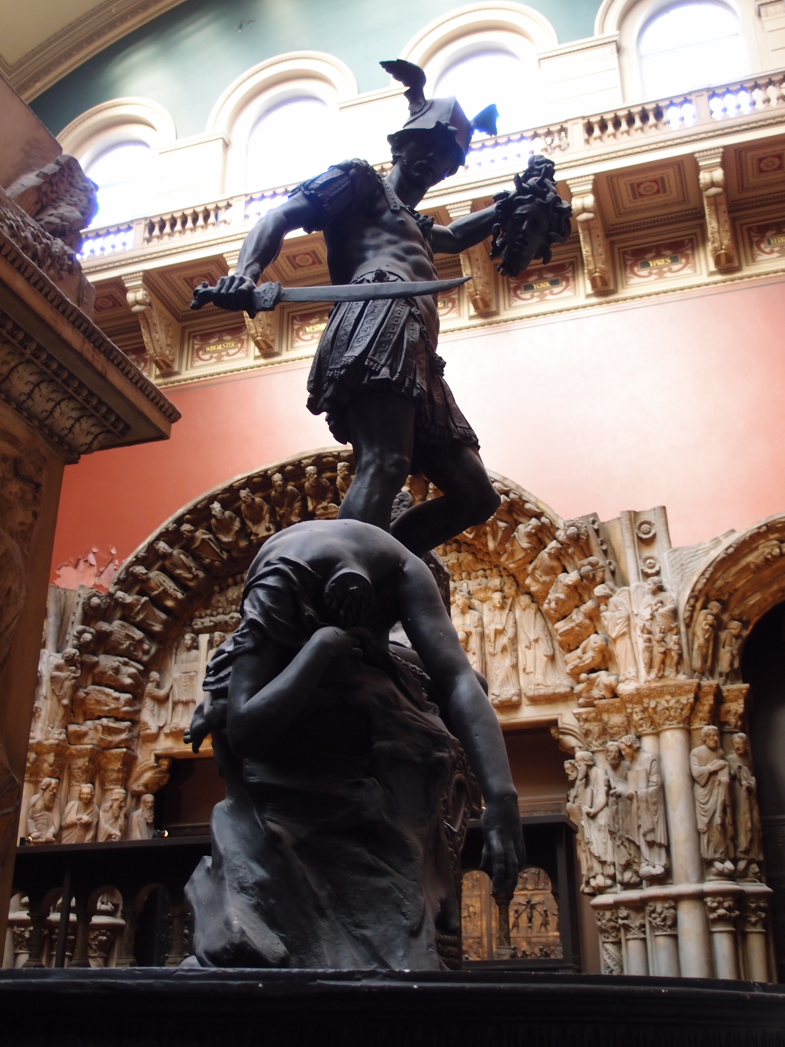 メドューサに勝利するペルセウス像（ヴィクトリア＆アルバート博物館蔵）